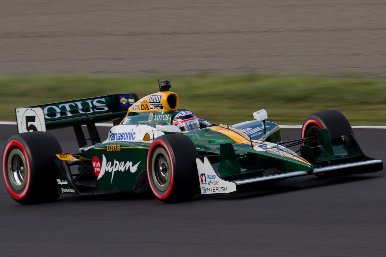 IndyCar Series 2011 Rd.15 Indy Japan 300: Takuma Sato (KV Racing)